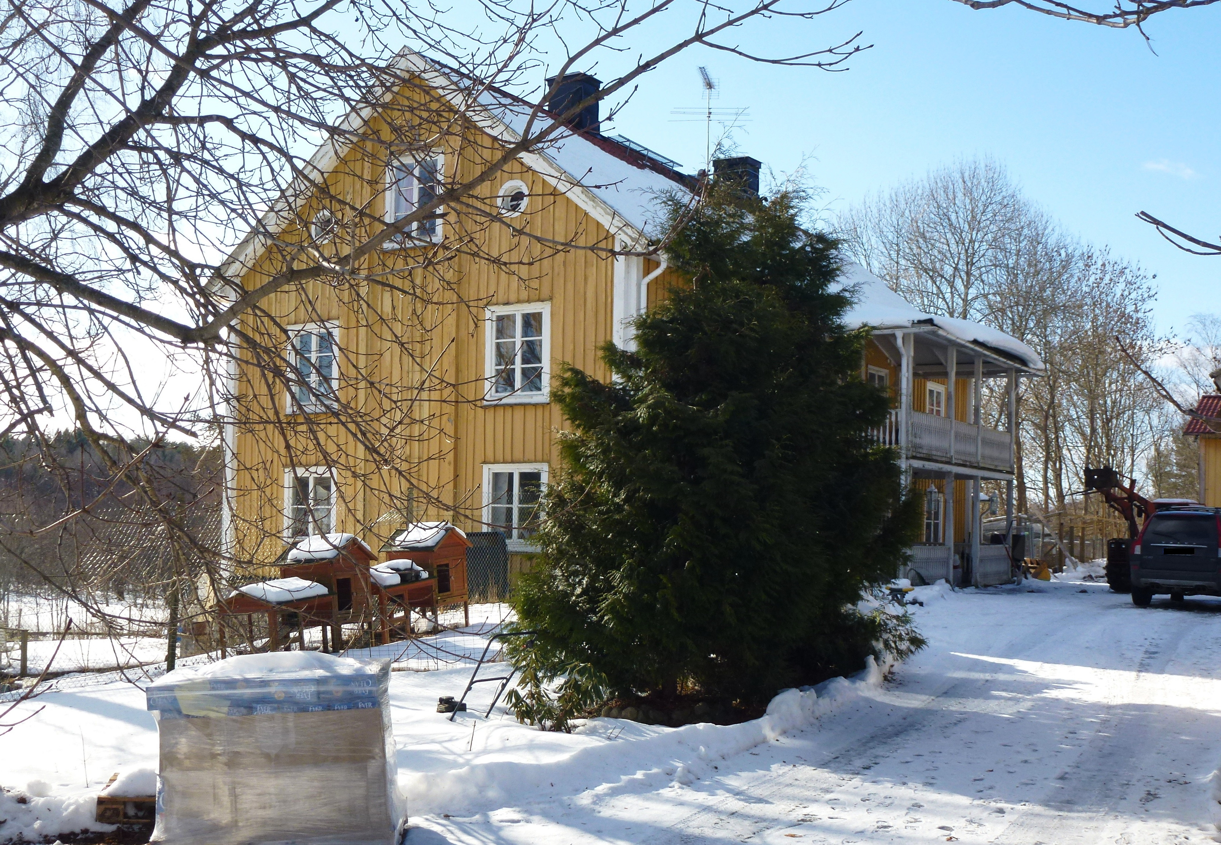 Hammarby prästgård och ekonomibyggnader